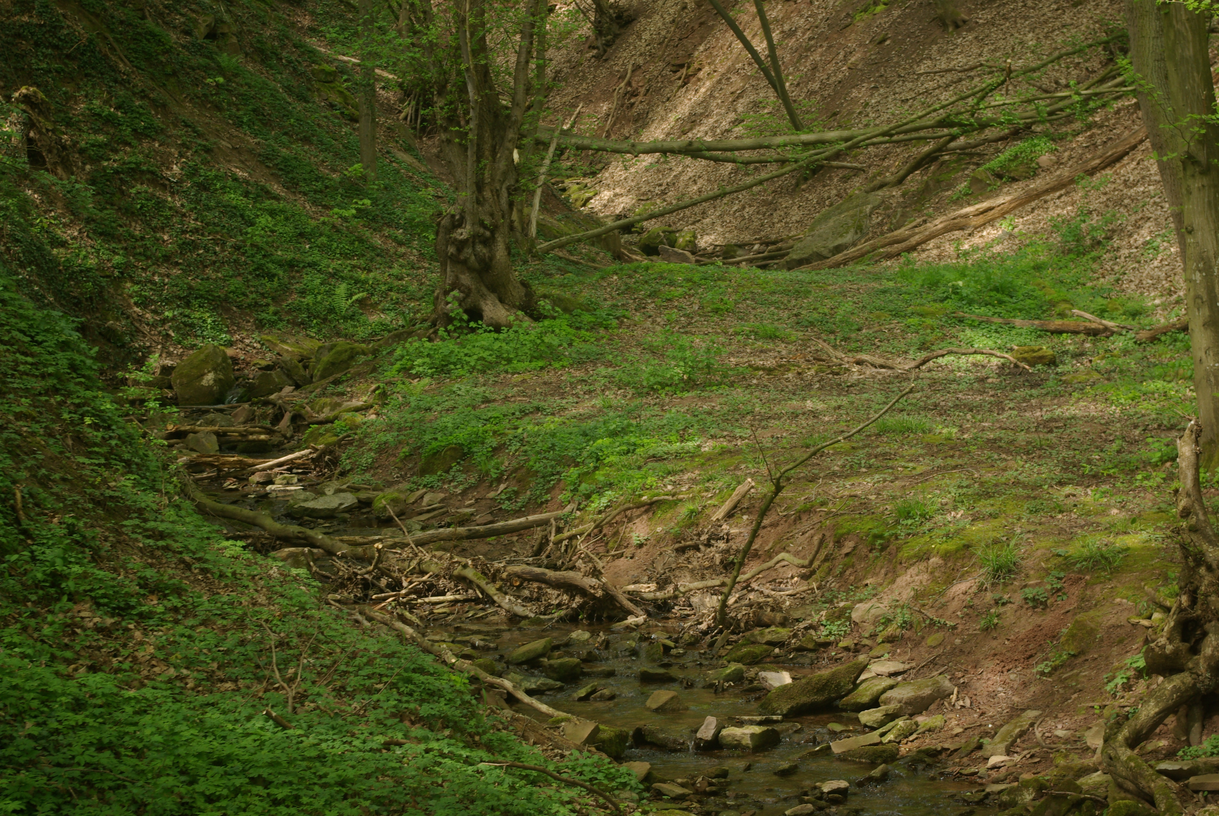 ND Ringelbachschlucht